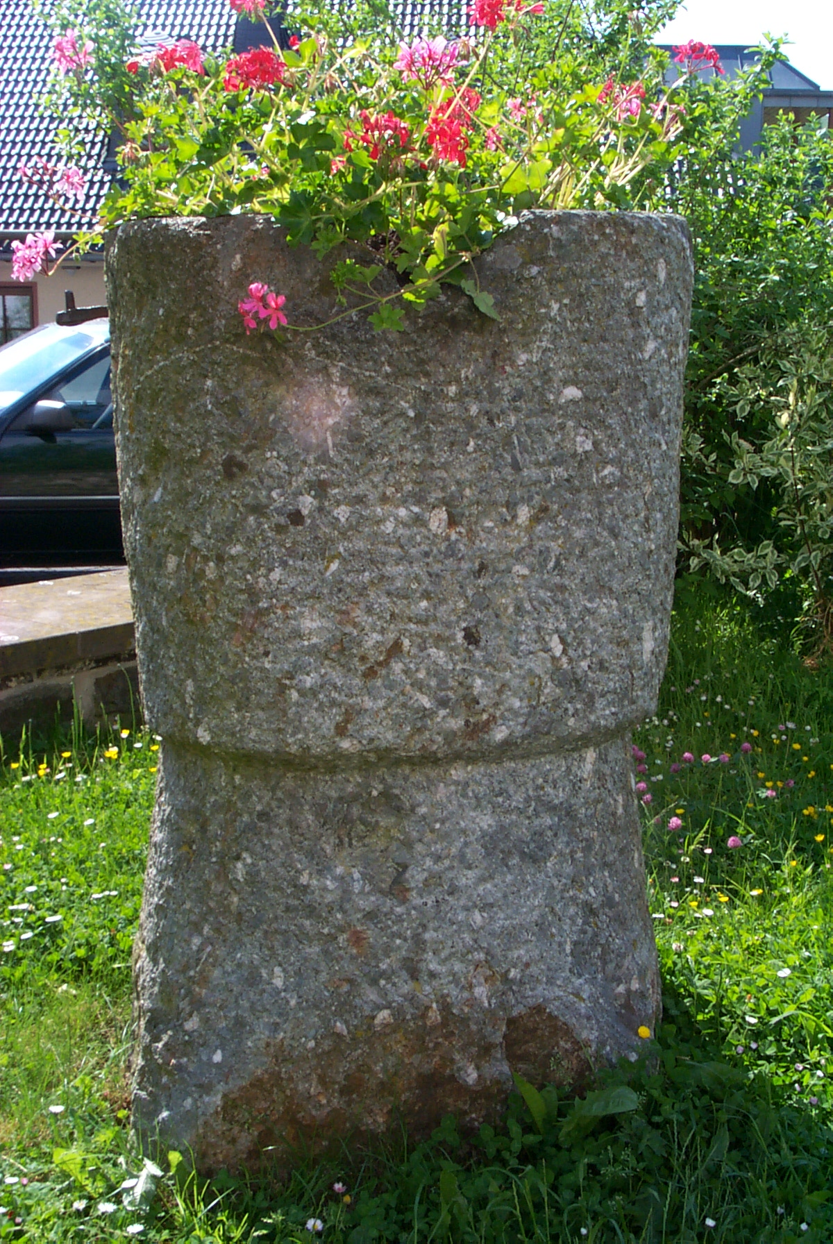 Romanischer Taufstein neben der Kirche in Binscheid, Gemeinde Üttfeld (Eifel, Deutschland). Der Sage nach hat der heilige Willibrord einen Taufstein aus einem heidnischen Menhir meißeln lassen und darin die ersten Christen getauft.